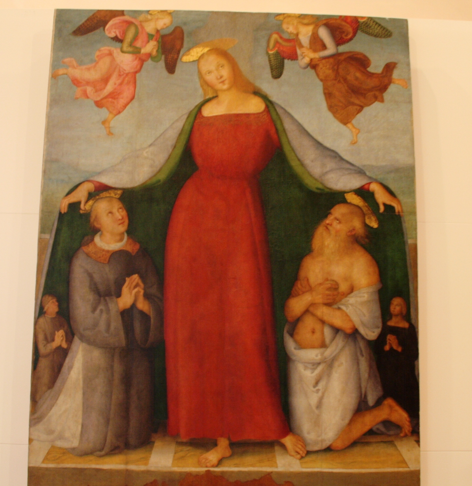 Perugino - Pietro Vannucci - Madonna della Misericordia con i santi Stefano e Girolamo e committenti, secondo decennio del XVI secolo. Bettona - Museo Palazzo del Podestà.